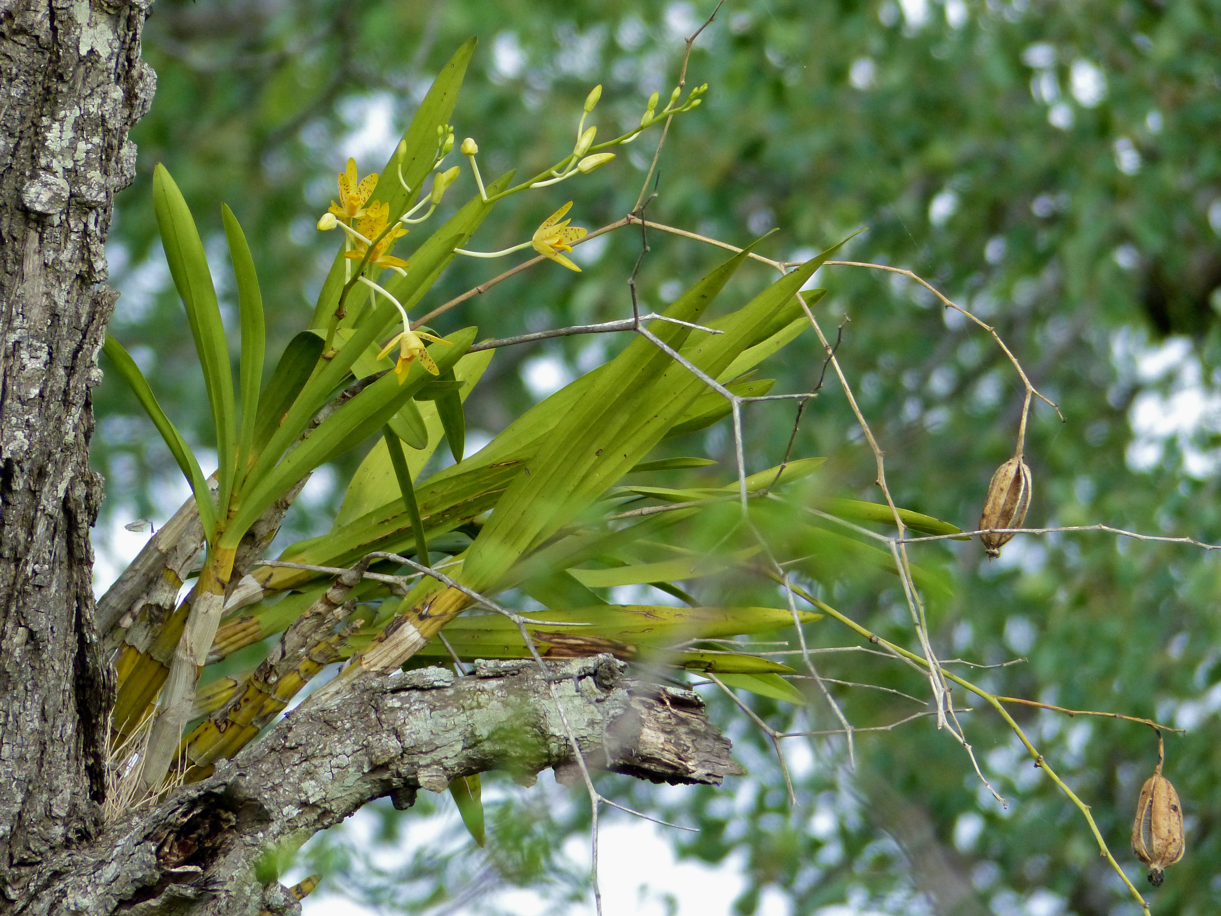 S25 (Crocodile) Road, Kruger NP, SOUTH AFRICA